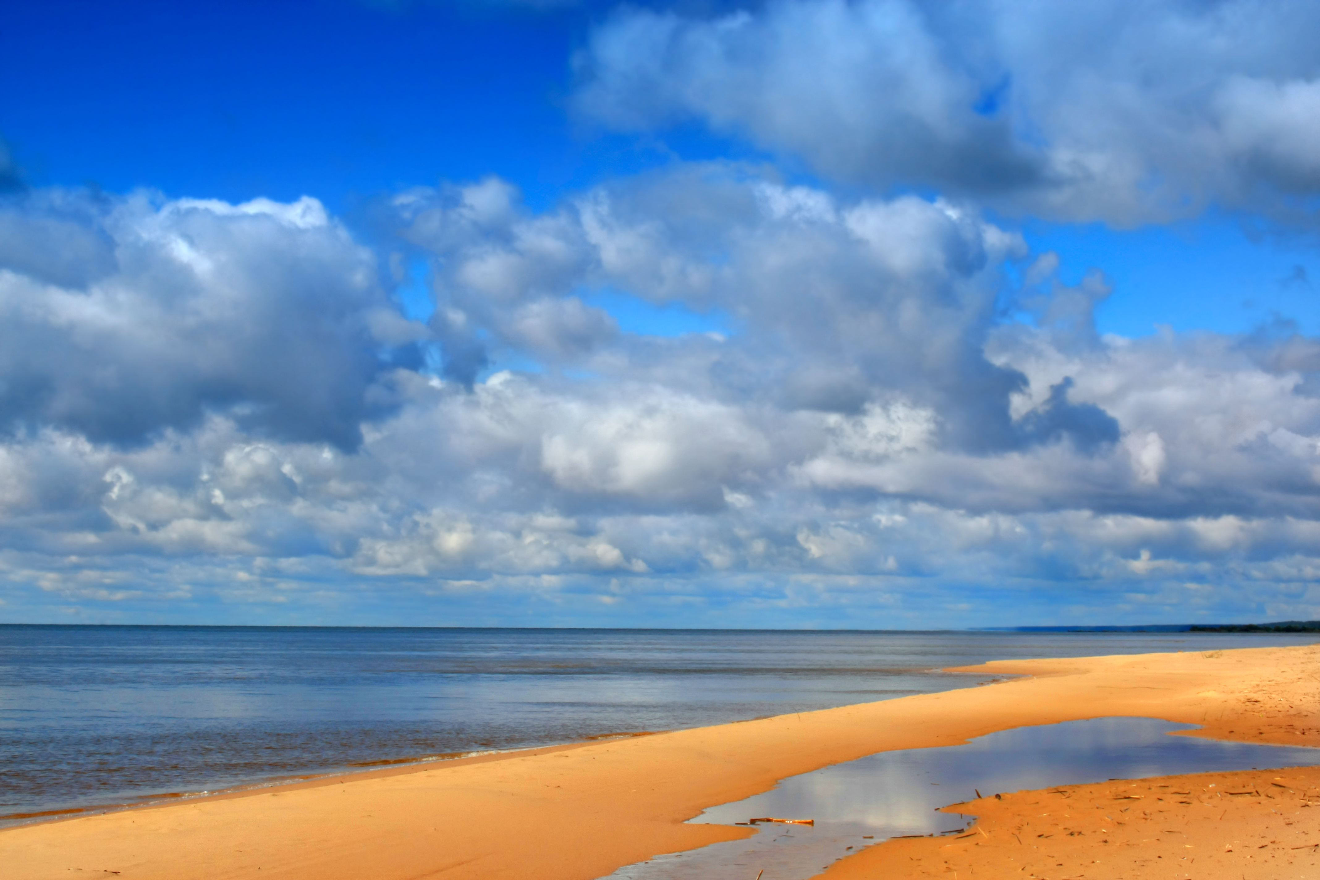 Peipsi järv